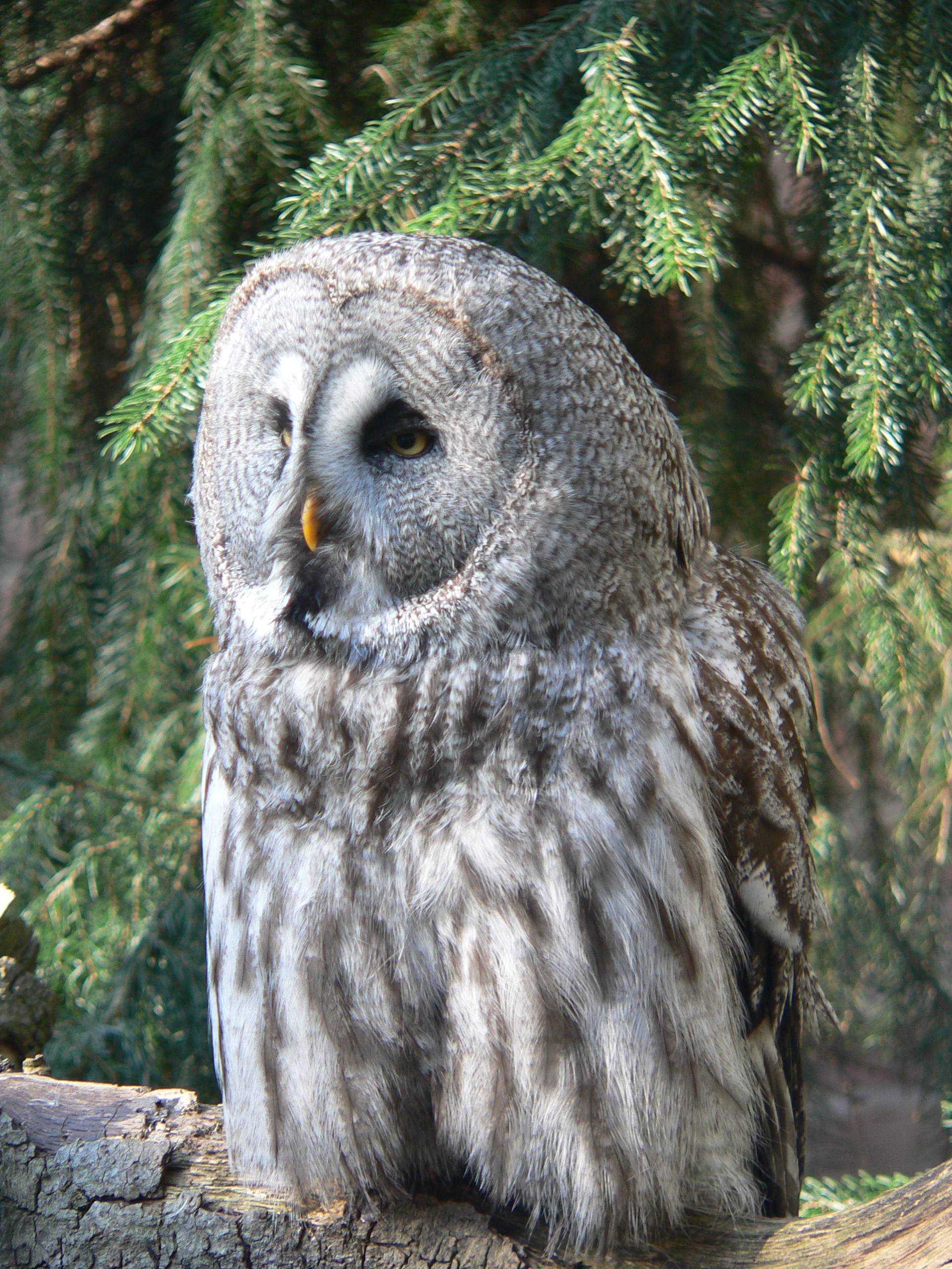 Bartkauz